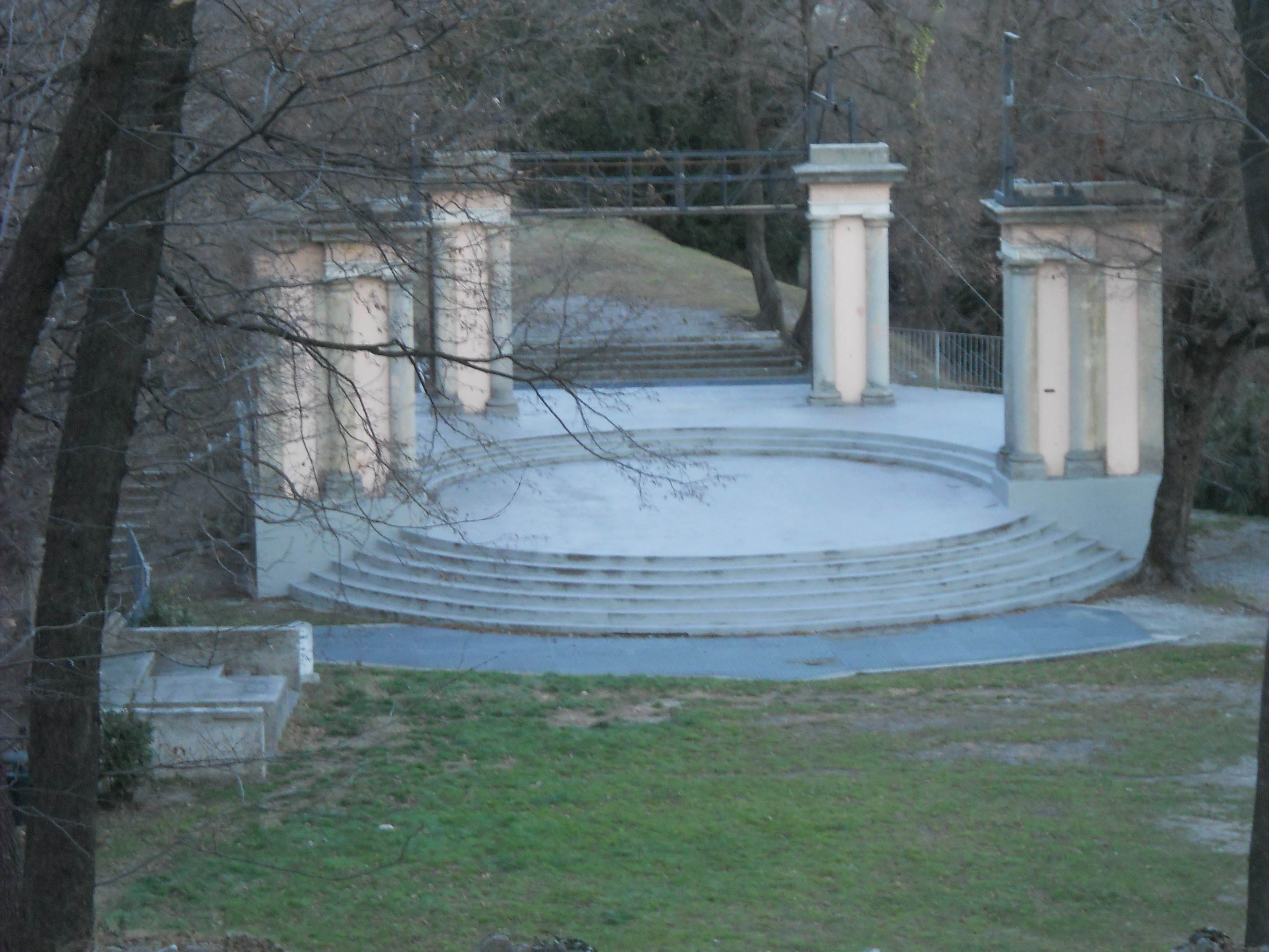 Teatro all'aperto Licinium, Erba, Como, Italia